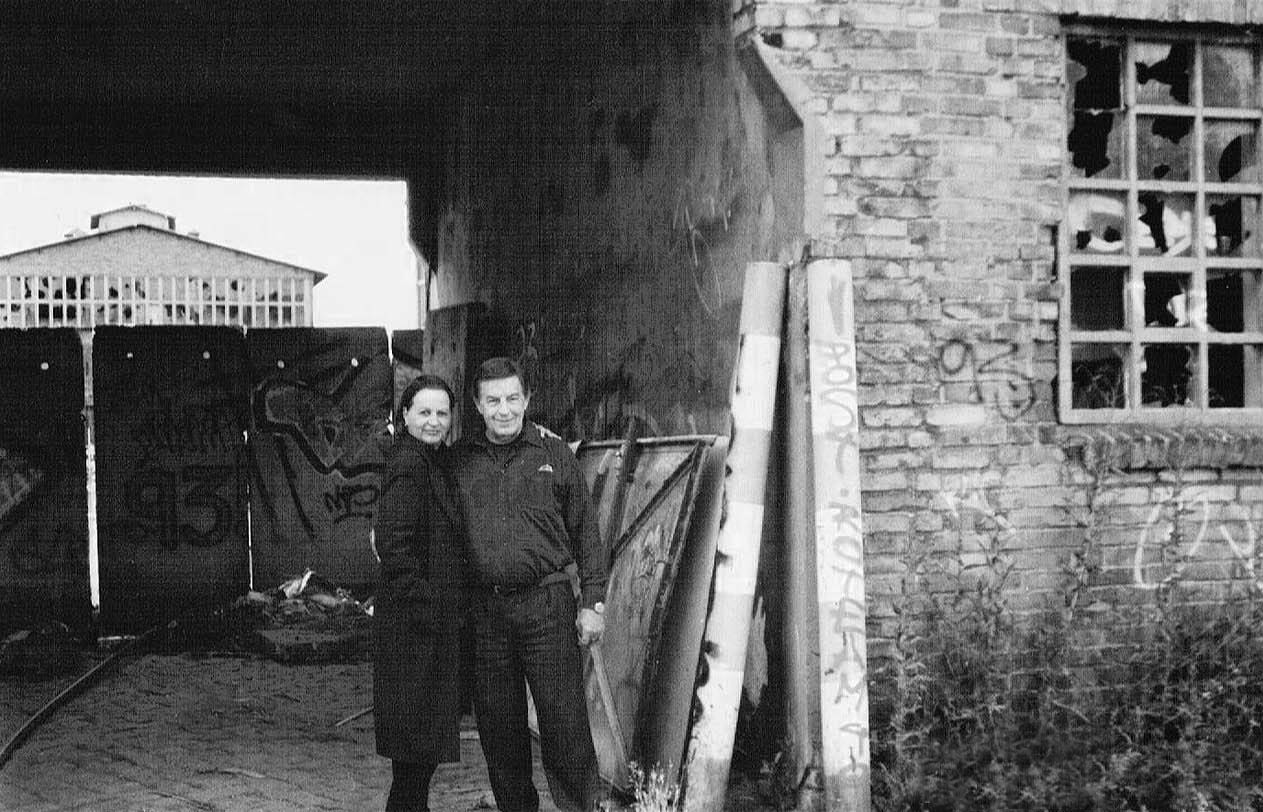 Rengha Rodewill und Rolf Kühn im Oktober 2000 auf dem verwahrlosten Gelände des „Waschhaus“. Heute ist das Waschhaus (Potsdam) in der Schiffbauergasse das größte freie Kulturzentrum Brandenburgs.